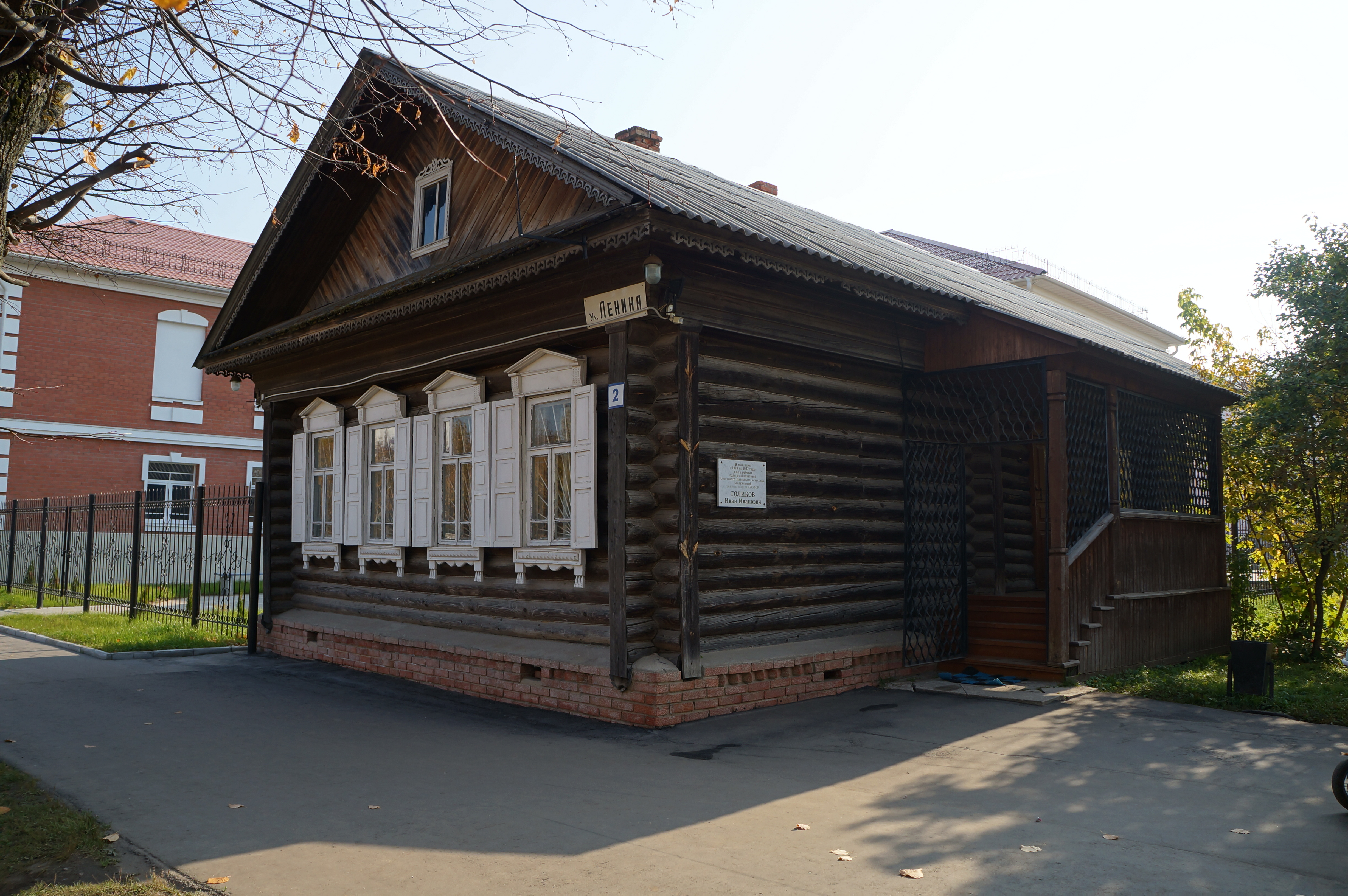 Дом, в котором в 1929-1937г. жил и работал один из основоположников советского искусства Палеха И.И. Голиков: улица Ленина, 2, Палех, Палехский район, Ивановская область